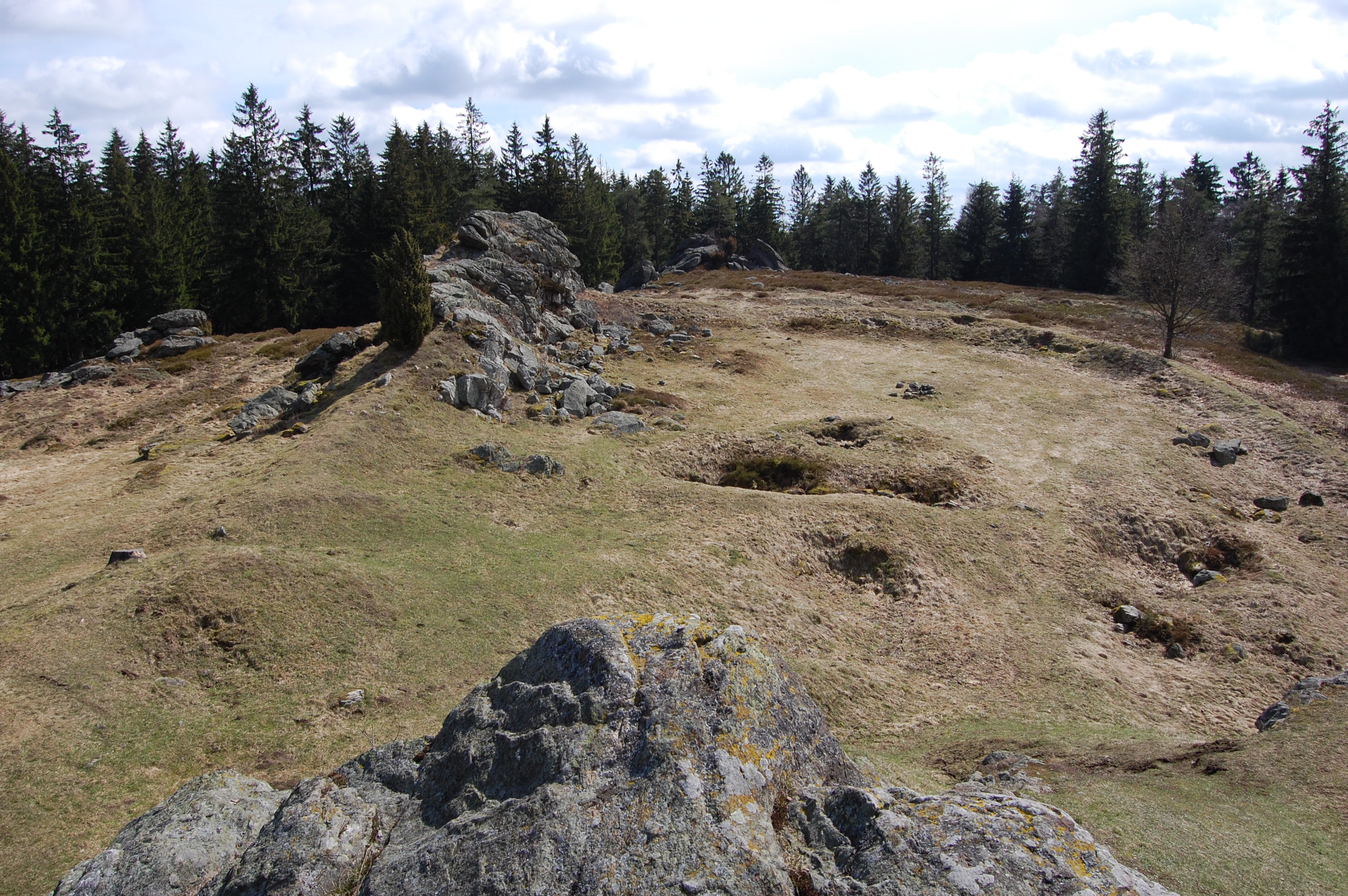 Reste des Burgstalls Wildstein bei der Ortschaft Wildstein, Gemeinde Teunz, Landkreis Schwandorf (Bayern)